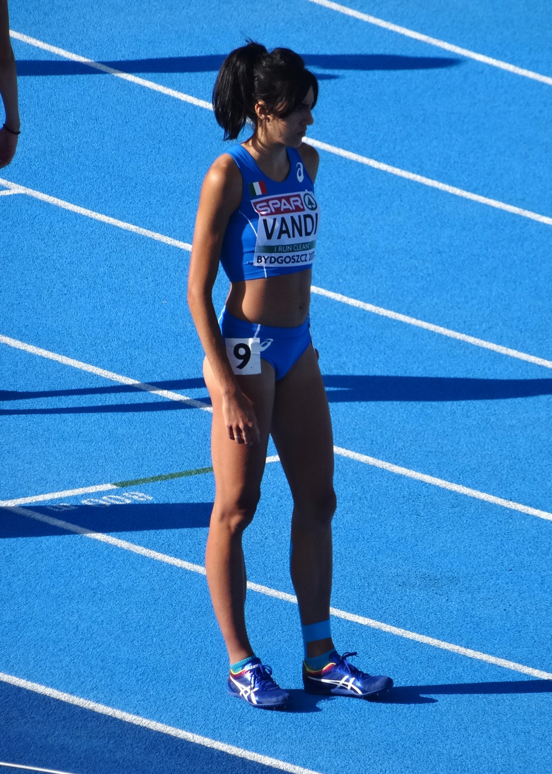 Młodzieżowe Mistrzostwa Europy w Lekkoatletyce U23 w Bydgoszczy 13-16 lipca 2017, kwalifikacje biegu na 800 m kobiet